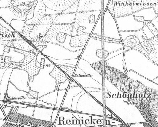 Gebiet von Berlin-Wilhelmsruh um 1892 übernommen von [1], Genehmigung des Autors zur Verwendung als Public Domain liegt mir (Mazbln) vor